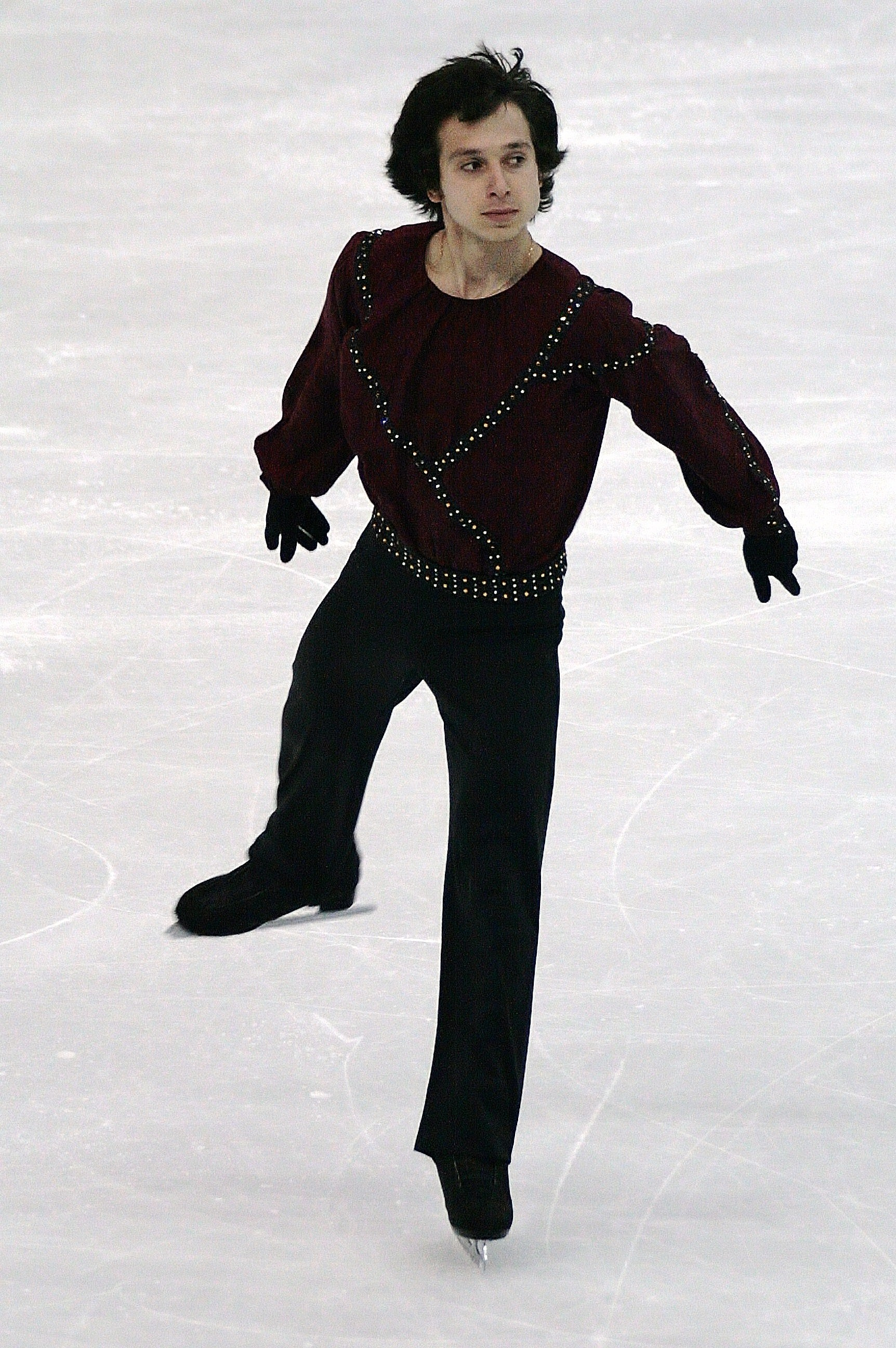 Алексей Быченко (Израиль) на чемпионате мира по фигурному катанию 2012.